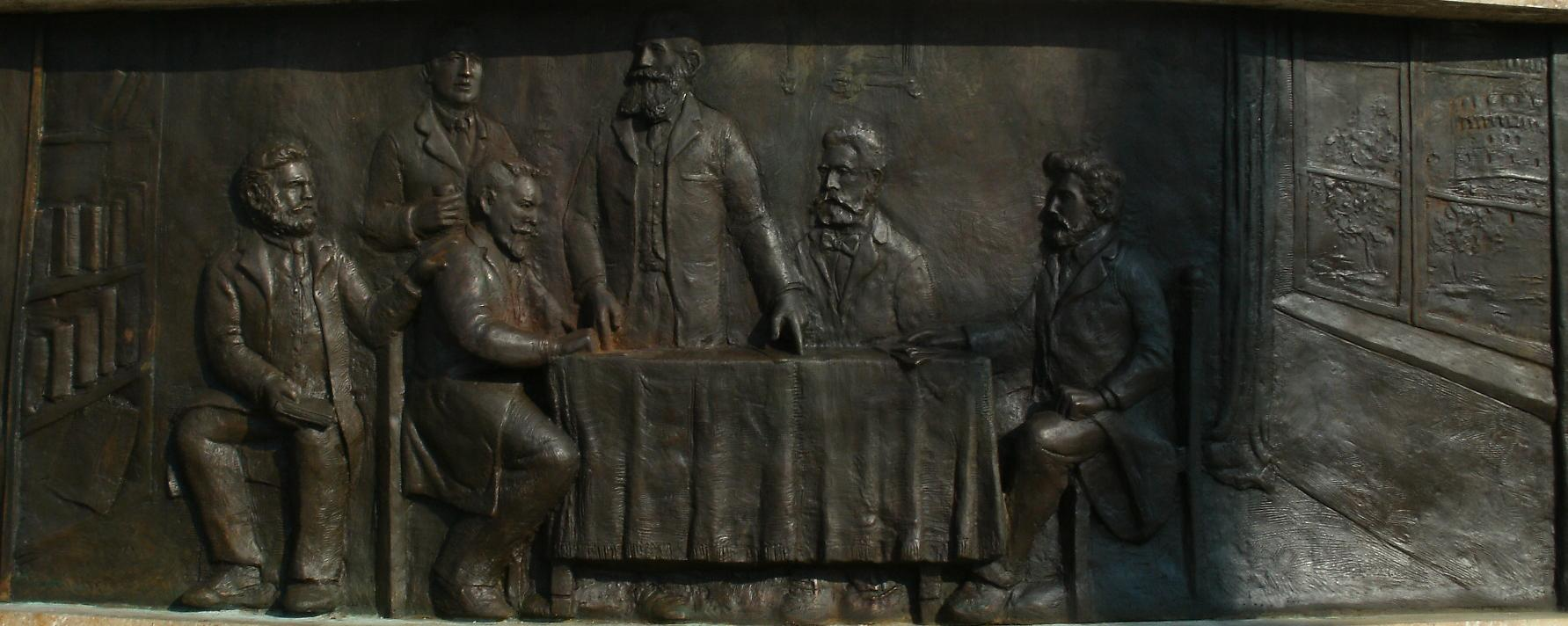 Релјев од споменикот Даме Груев, основање на МРО